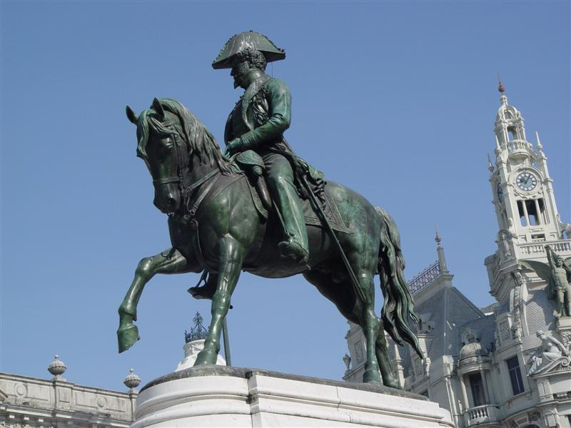 Monumento a D. Pedro IV. Praça da Liberdade Porto by (Célestin Anatole Calmels - 1866) Foto de Jose Goncalves